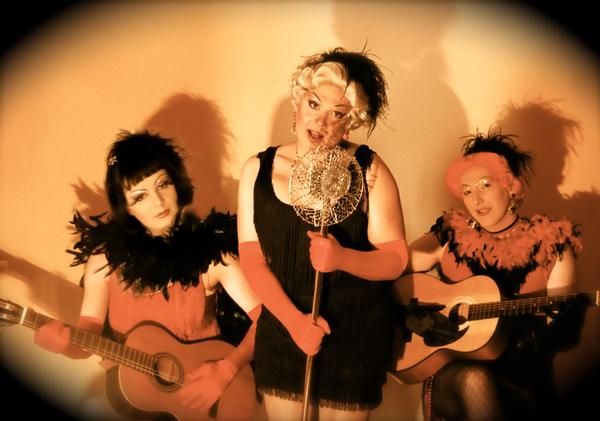 Drastik Queen: Lauren DeGlamour, La Marchesa, Sheila De Rose